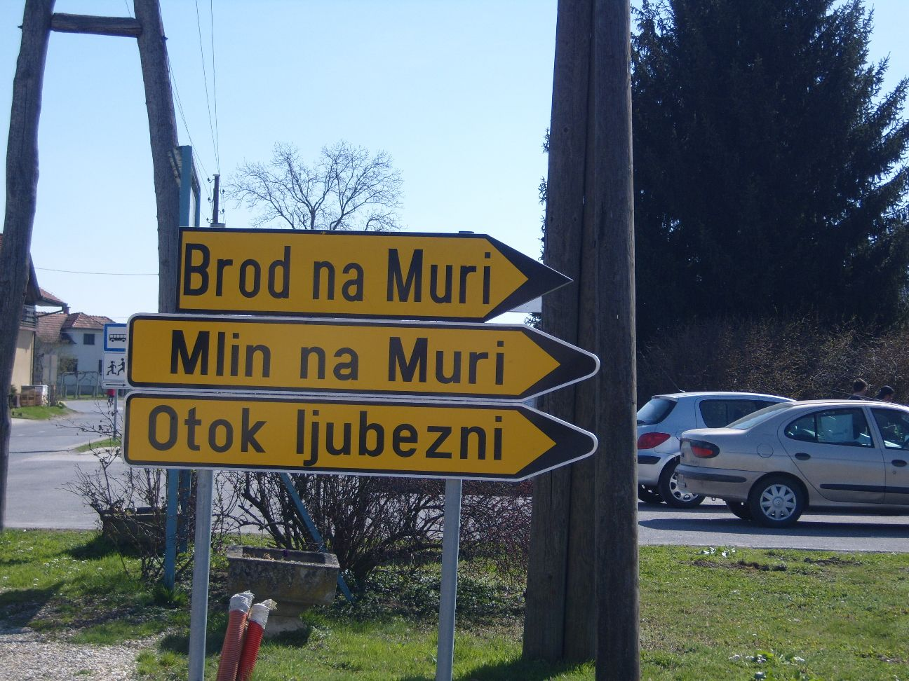 32 Vielversprchende Abzweigung bei Izakovci